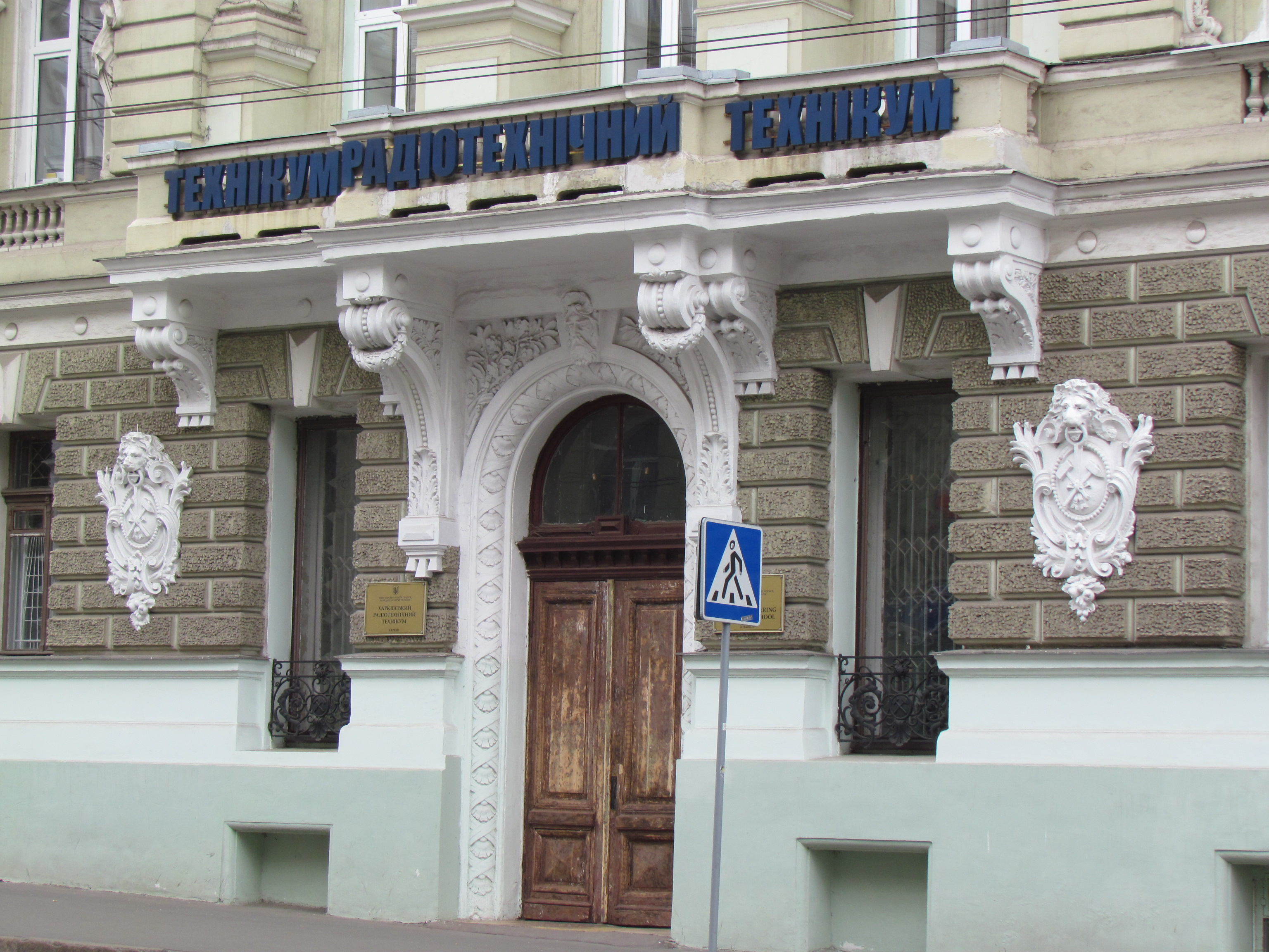 Україна, Харків, вул. Сумська, 18-20